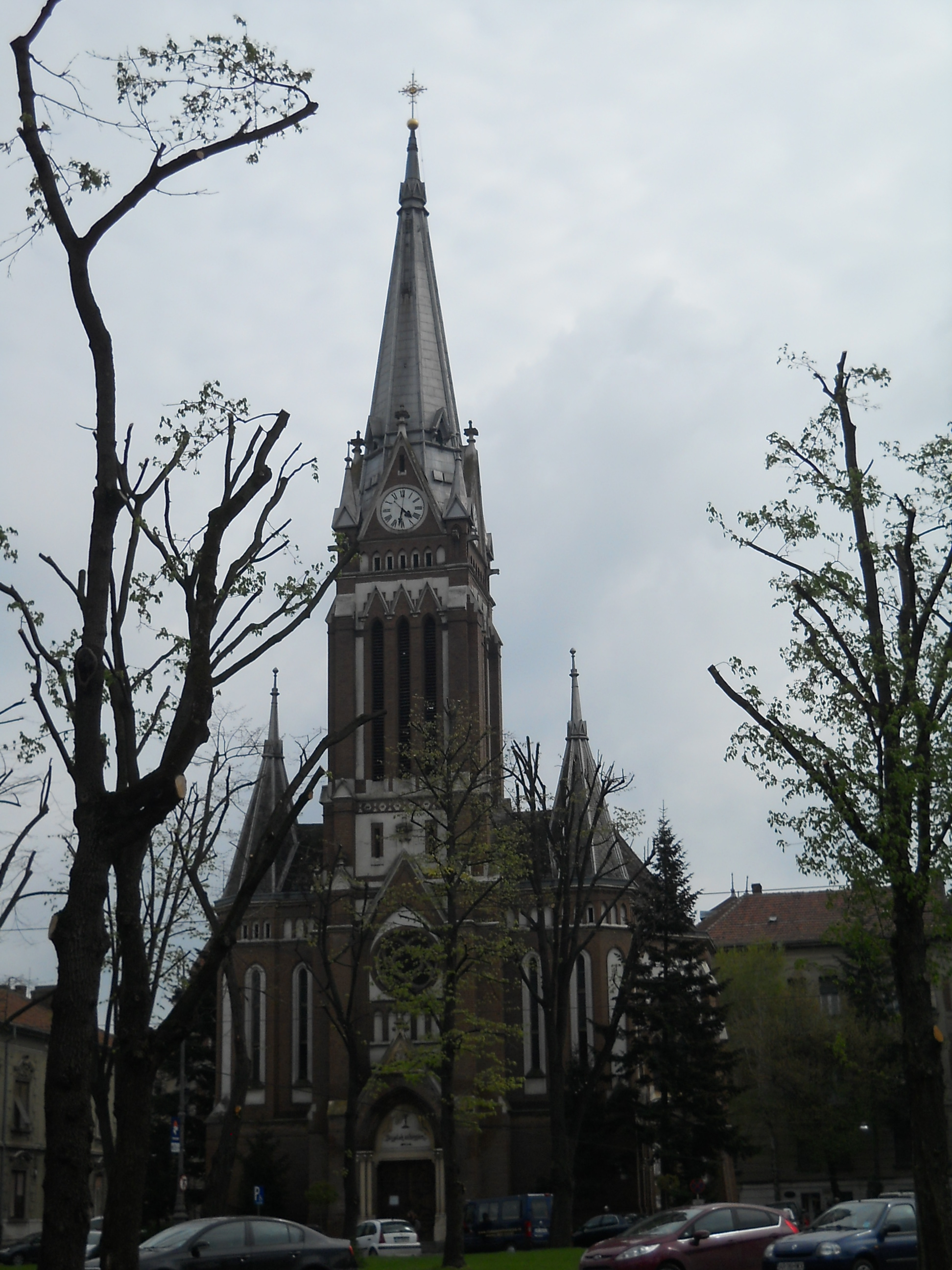 Imagine luată de pe celălalt trotuar cuprinzând întregul lăcaș de cult